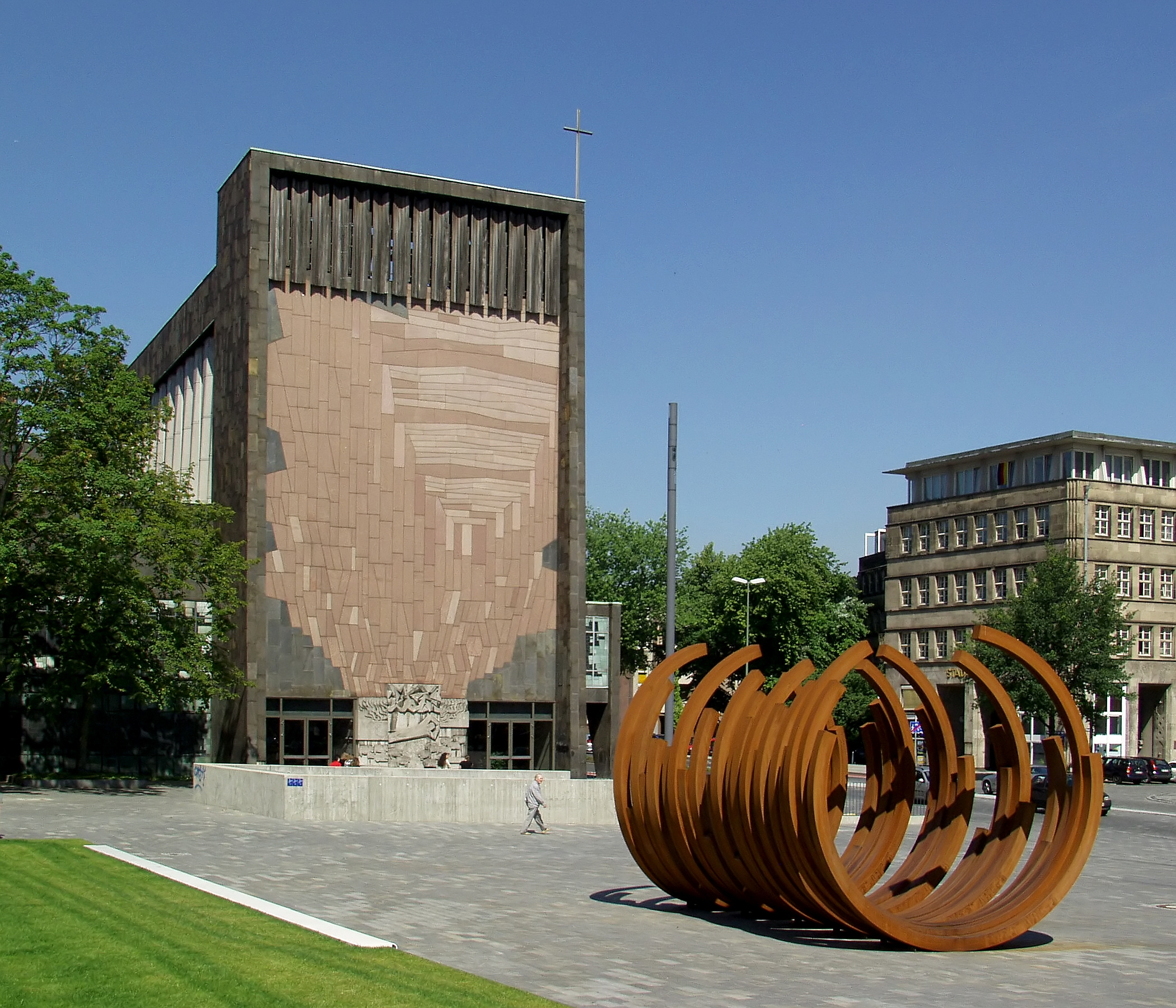 Liebfrauenkirche in Duisburg, im Vordergrund eine Stahlskulptur von Bernar Venet